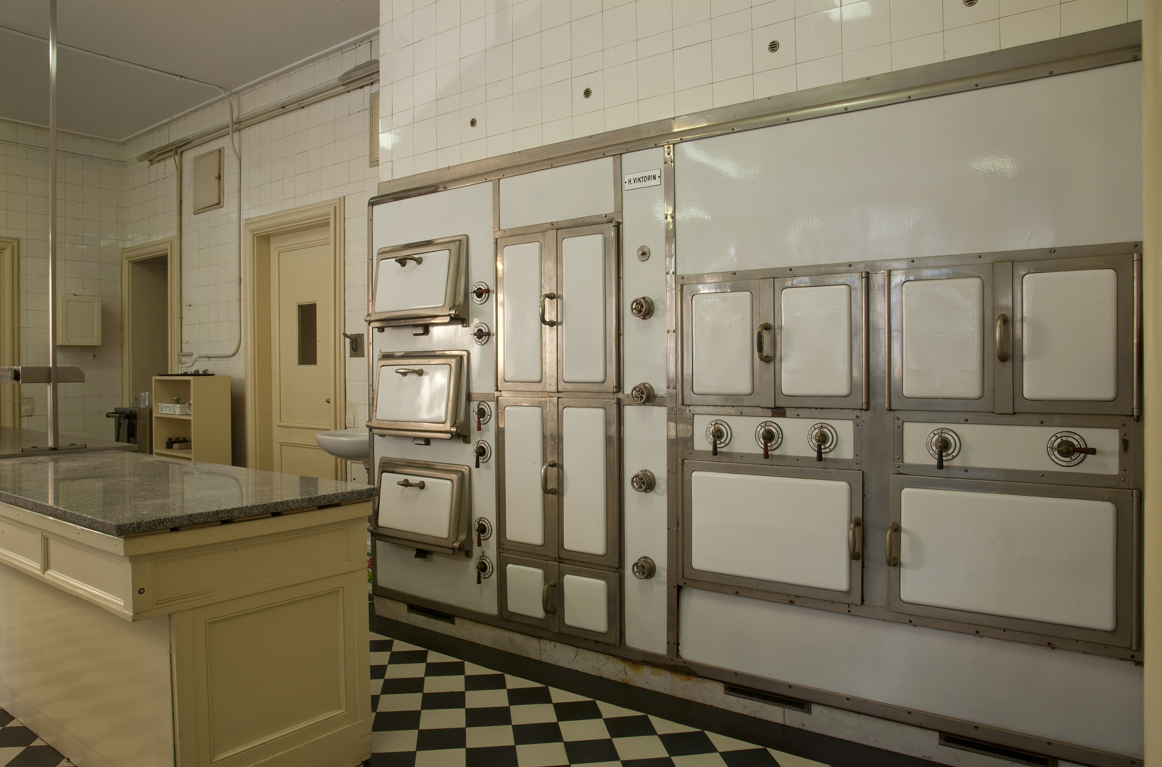 Uprostřed kuchyně je velký stůl pro přípravu jídla s celistvou mramorovou deskou a velký plynový sporák, zařízení s několika troubami a grilem zabírá celou stěnu.